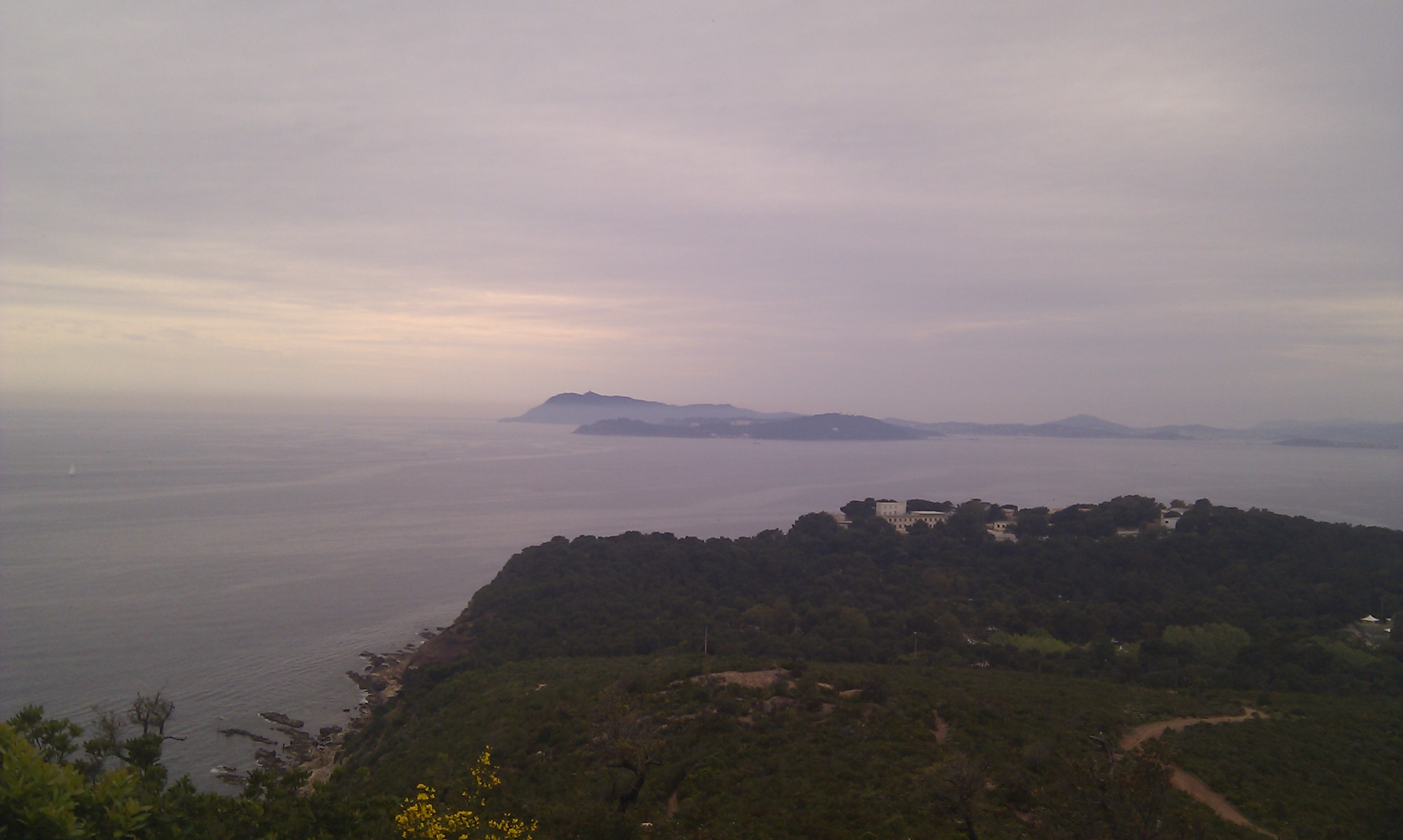 presqu'île de Saint-Mandrier (83)